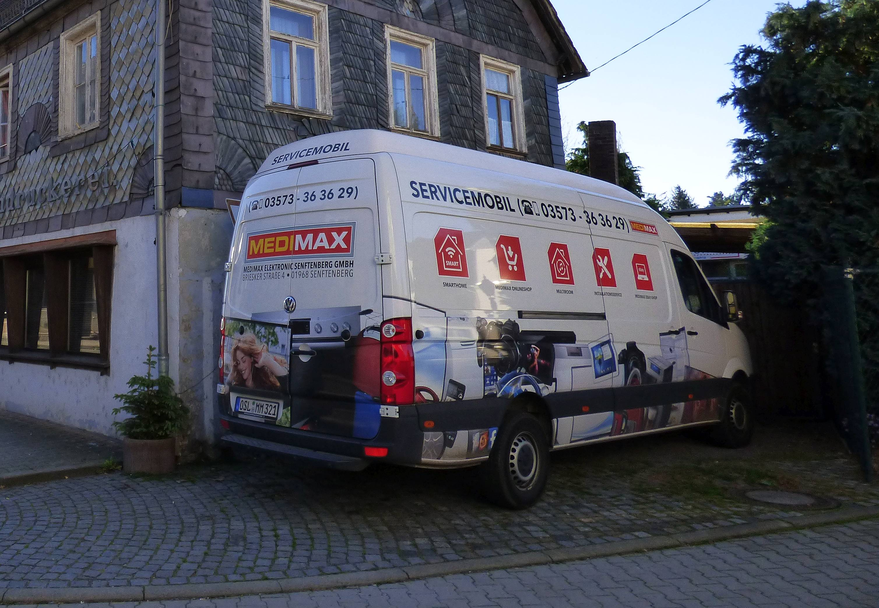 Marktbrunnen in Ruhland